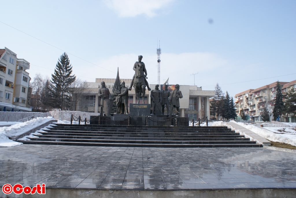 Grupul statuar "Mihai Viteazul"